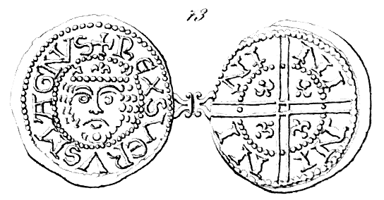 Münze von Sverre Sigurdsson, 1184-1202 König von Norwegen. Text: Adv: + REX SVERVS MAGNVS. Rev: NI NI NI NI. 0,405 g. Feinghalt 938 ‰.